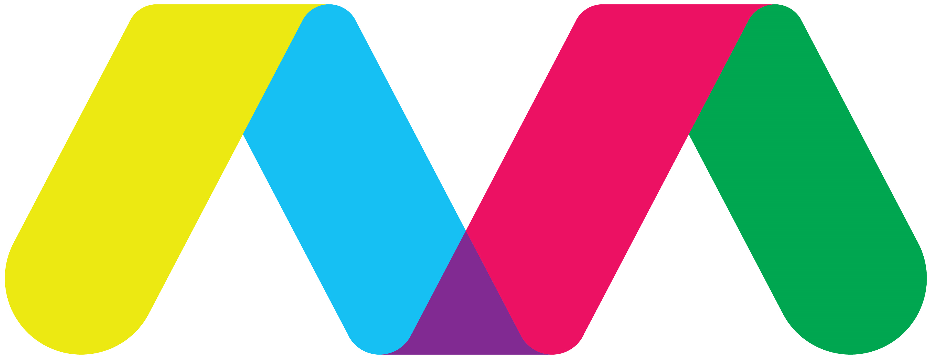 Логотип Бакинсокго метрополитена.